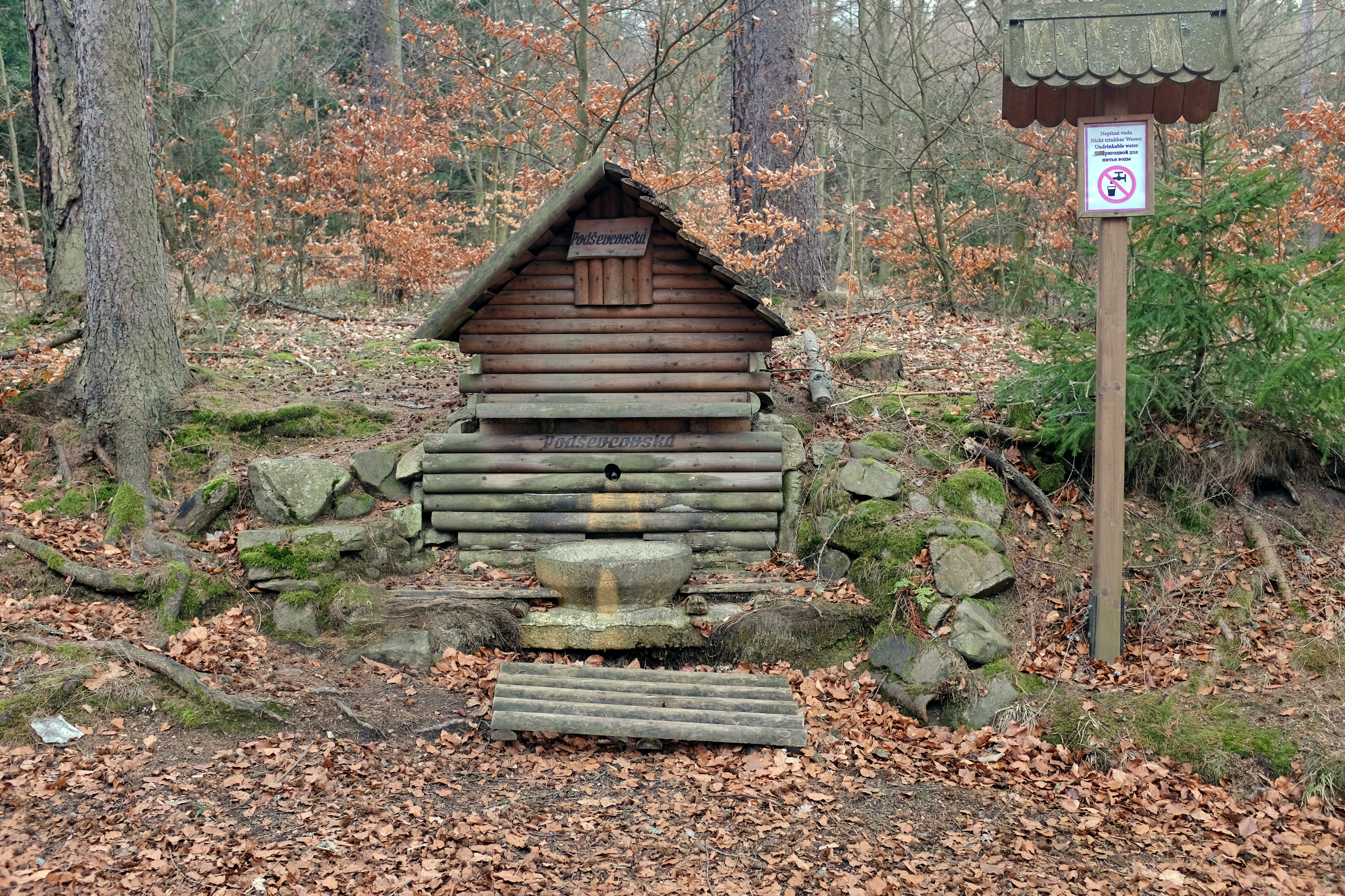 Karlovy Vary, lázeňské lesy, Podševcovská studánka